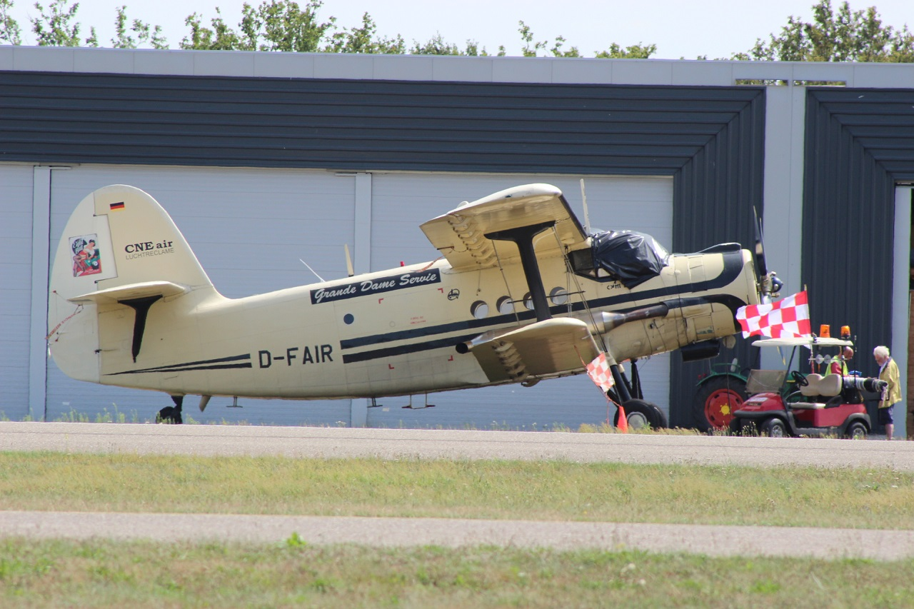 Antonov An-2 (D-FAIR) op Breda International Airport Augustus 2019